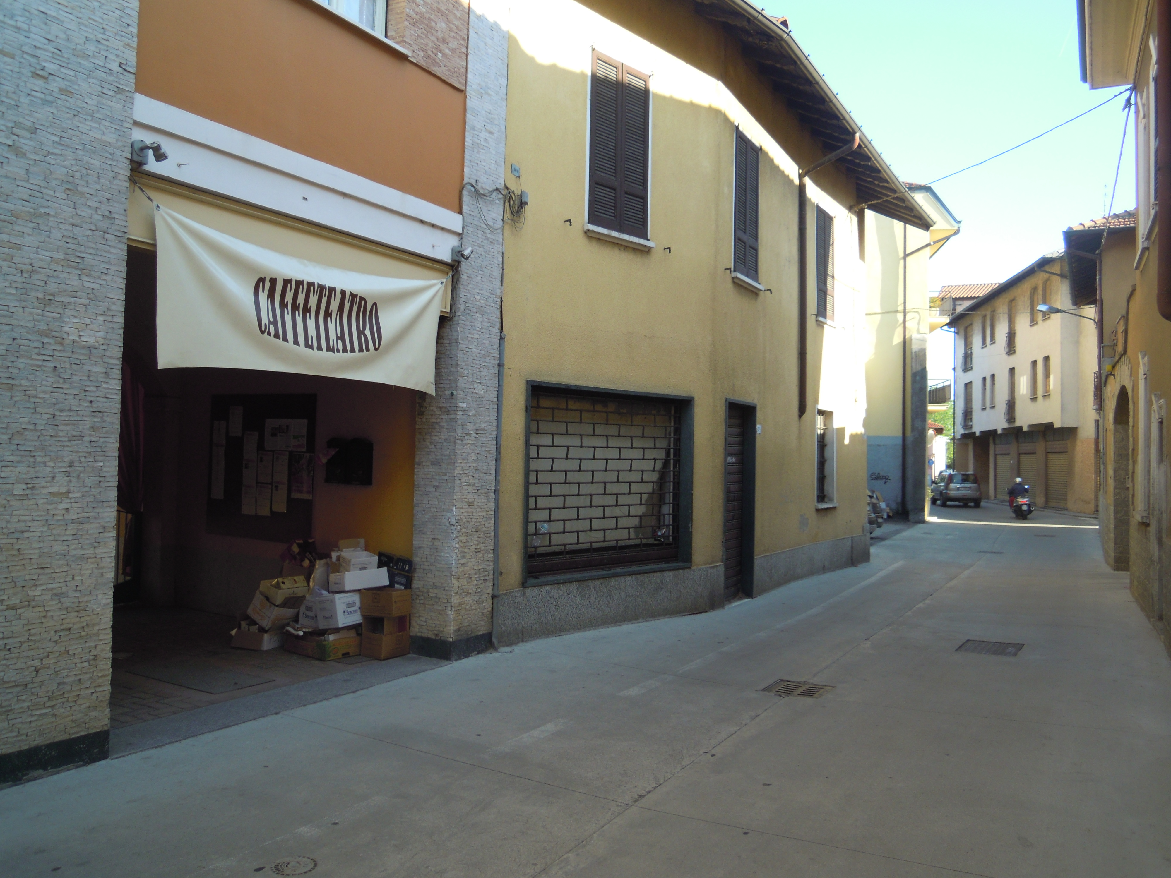 L'entrata dello storico locale Caffè Teatro a Verghera di Samarate (VA)